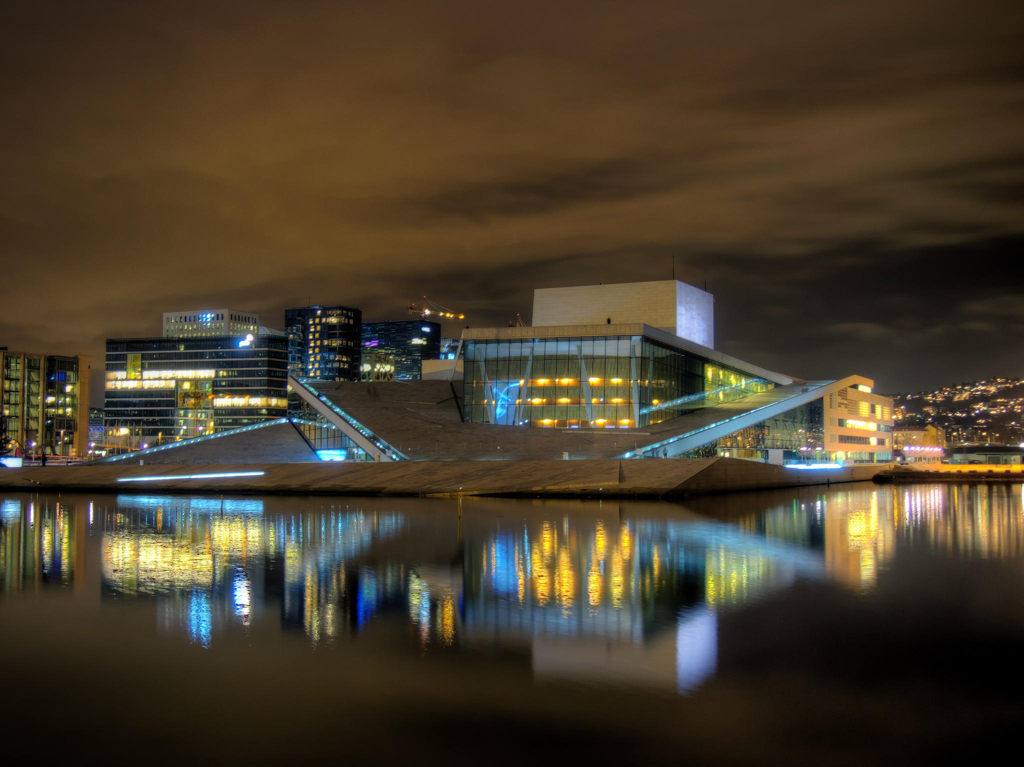 Оперный театр Осло ночью